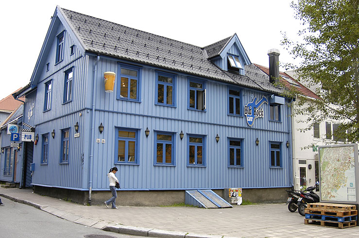 Blå Rock: Tromsøs mest rocka utested. Kultplass fordi de kun spiller rock, har trommesett og gitarer i taket og holder uforglemmelige konserter - og så har de byens beste burger.